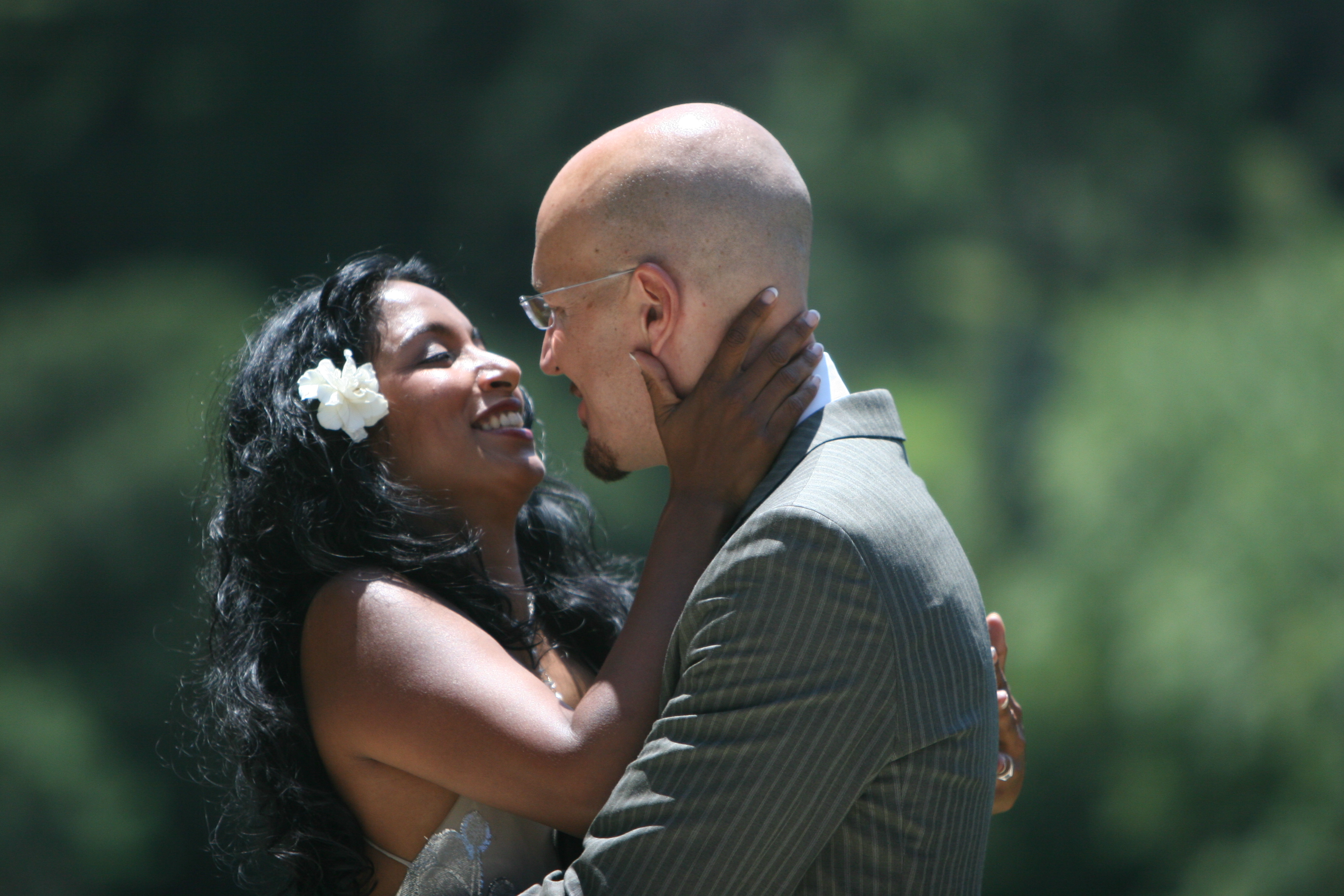 Partnerská láska.